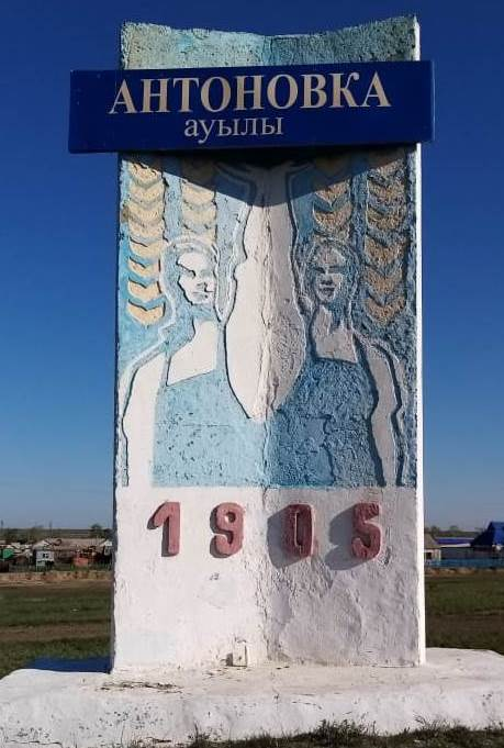 Обелиск с названием населенного пункта